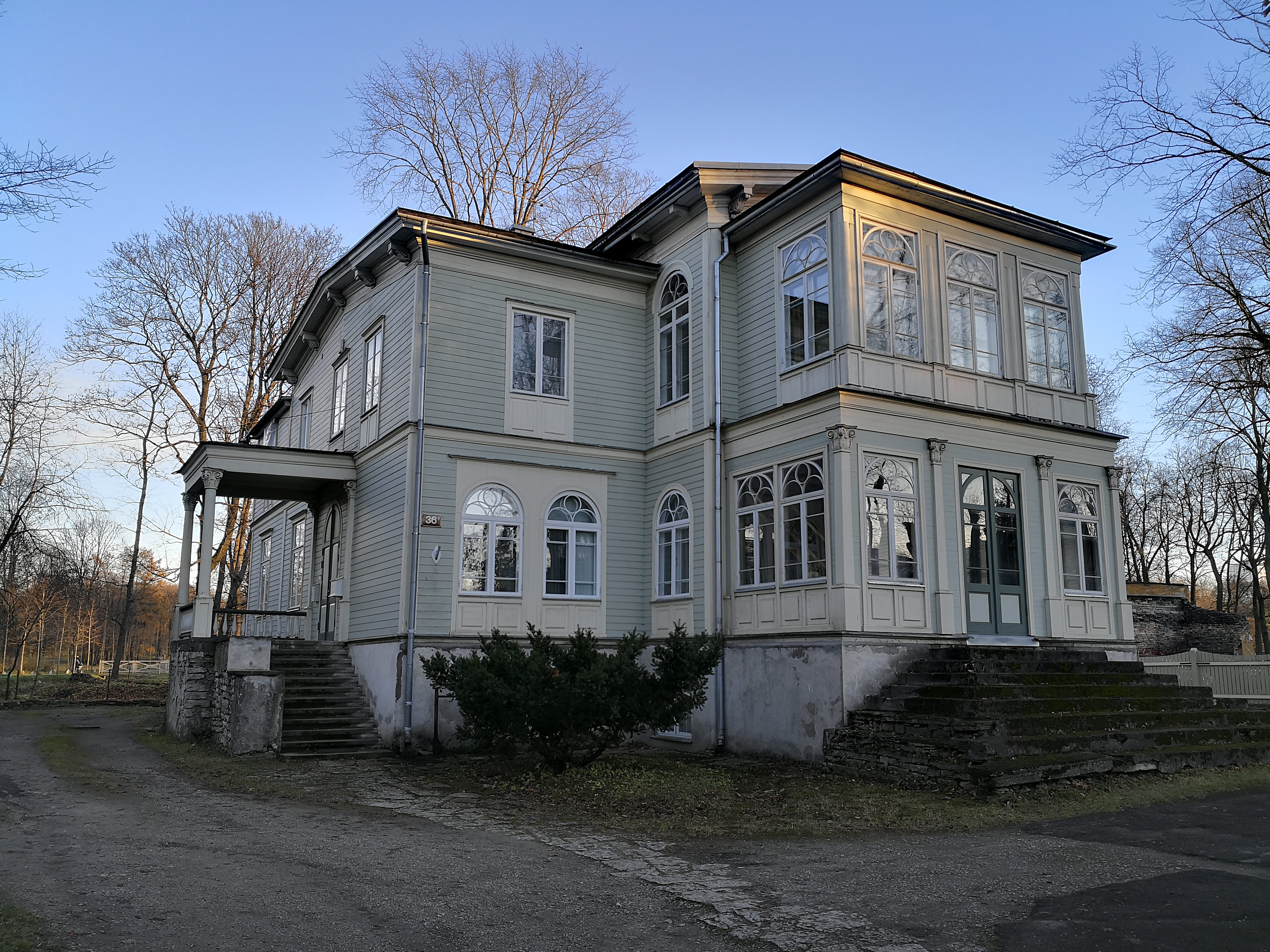 J. Poska 36A, Tallinn.